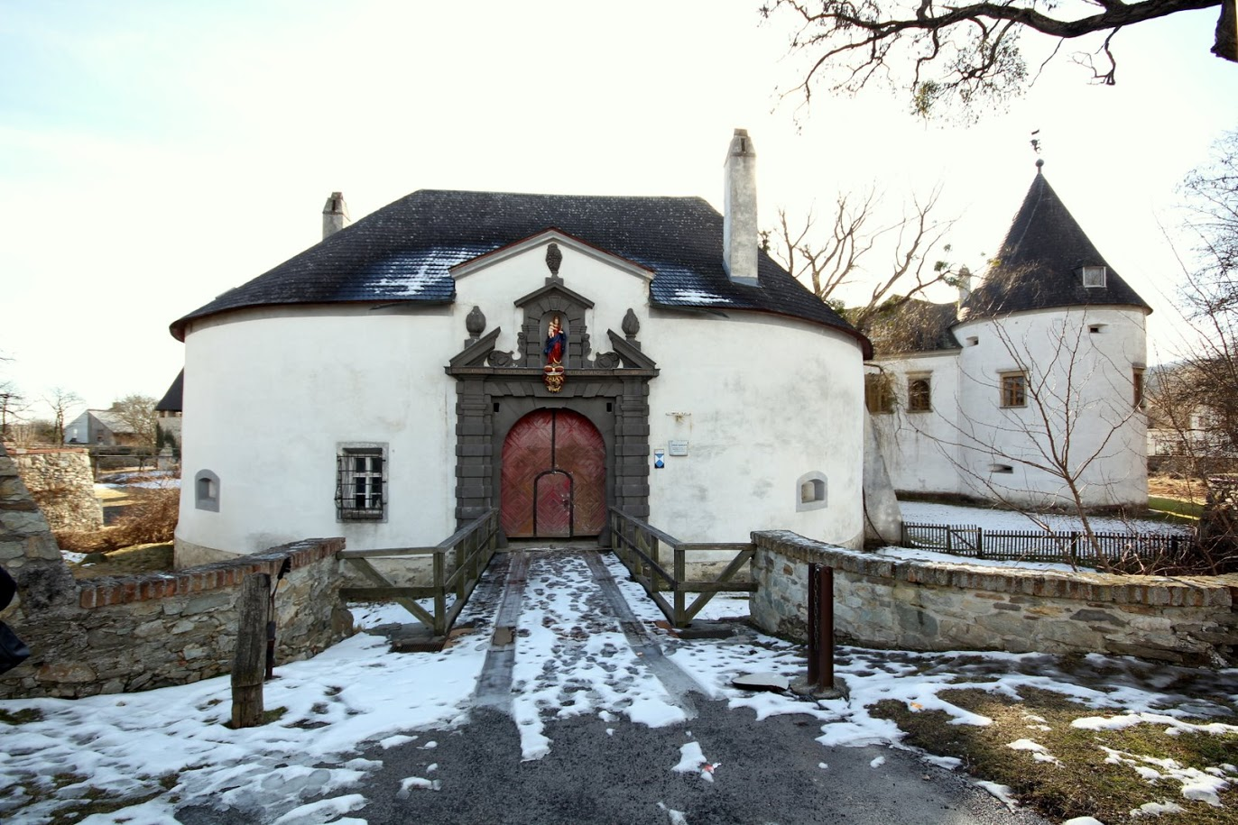 A kaboldi vár egyik bejárata